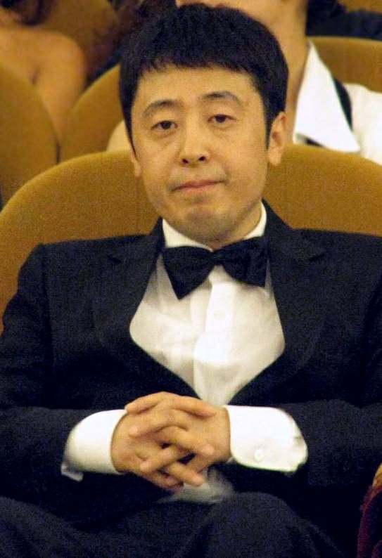 Jia Zhangke